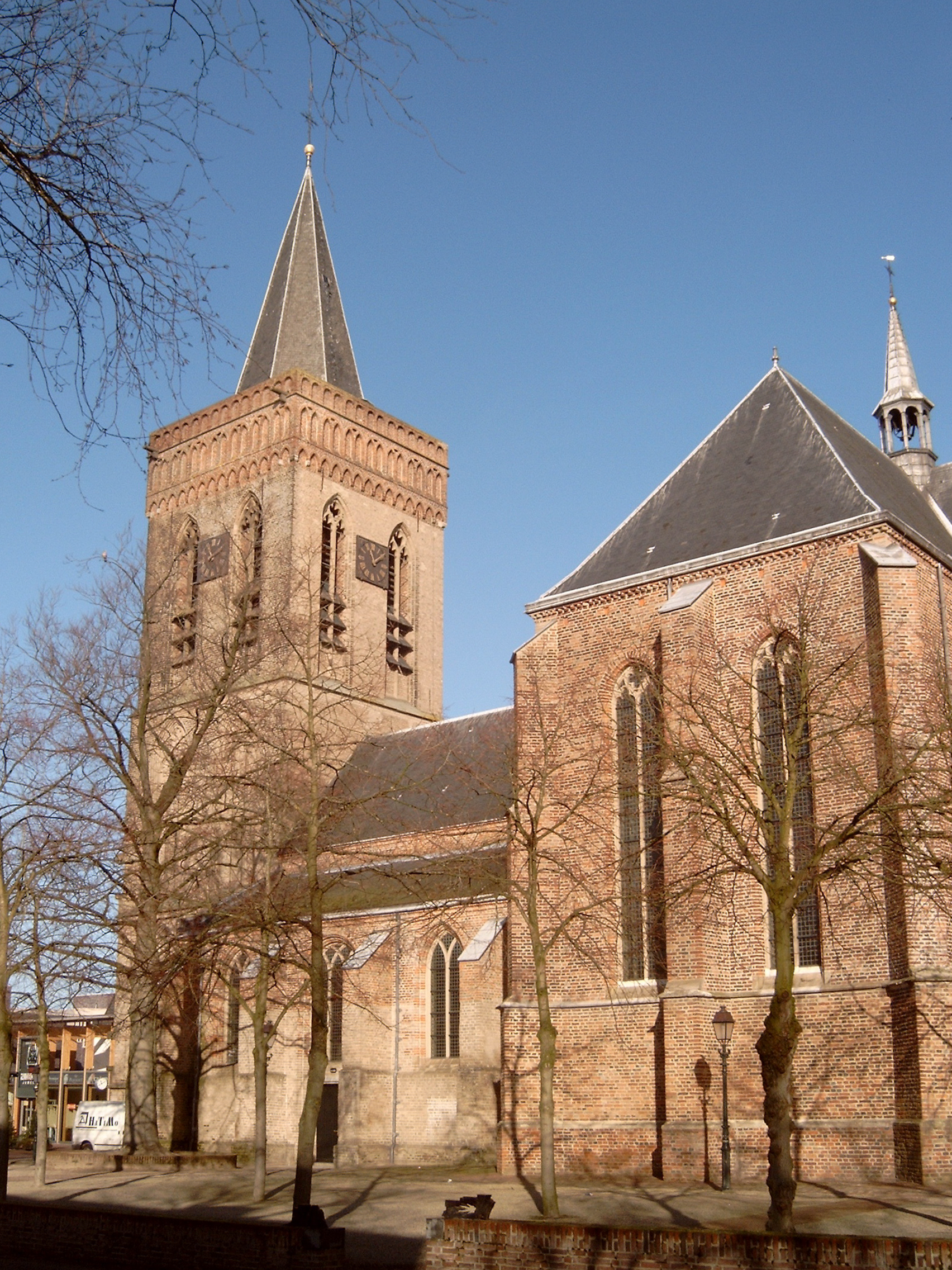 Ede, kerk in het centrum